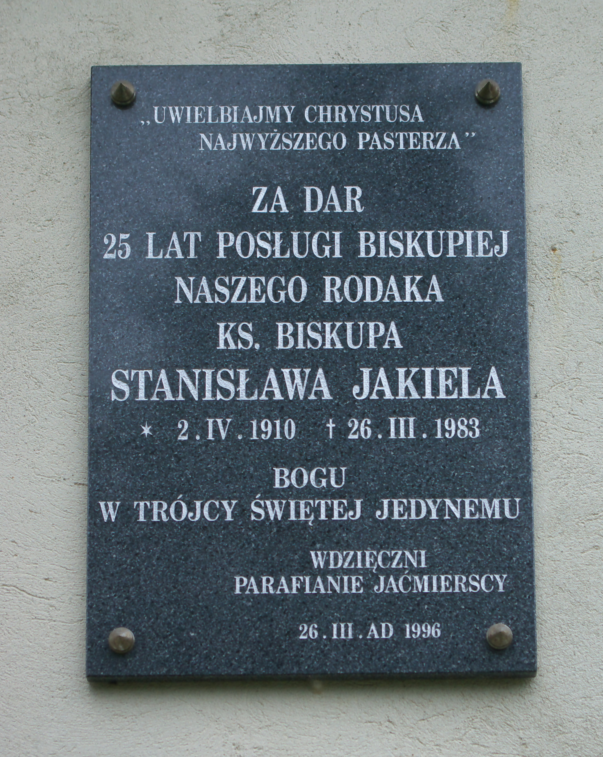 Dom nr 86 w Jaćmierzu. Dom Zakonny Zgromadzenia sióstr Służebniczek Najświętszej Maryi Panny Niepokalanie Poczętej. Tablica upamiętniająca ks. bpa Stanisława Jakiela